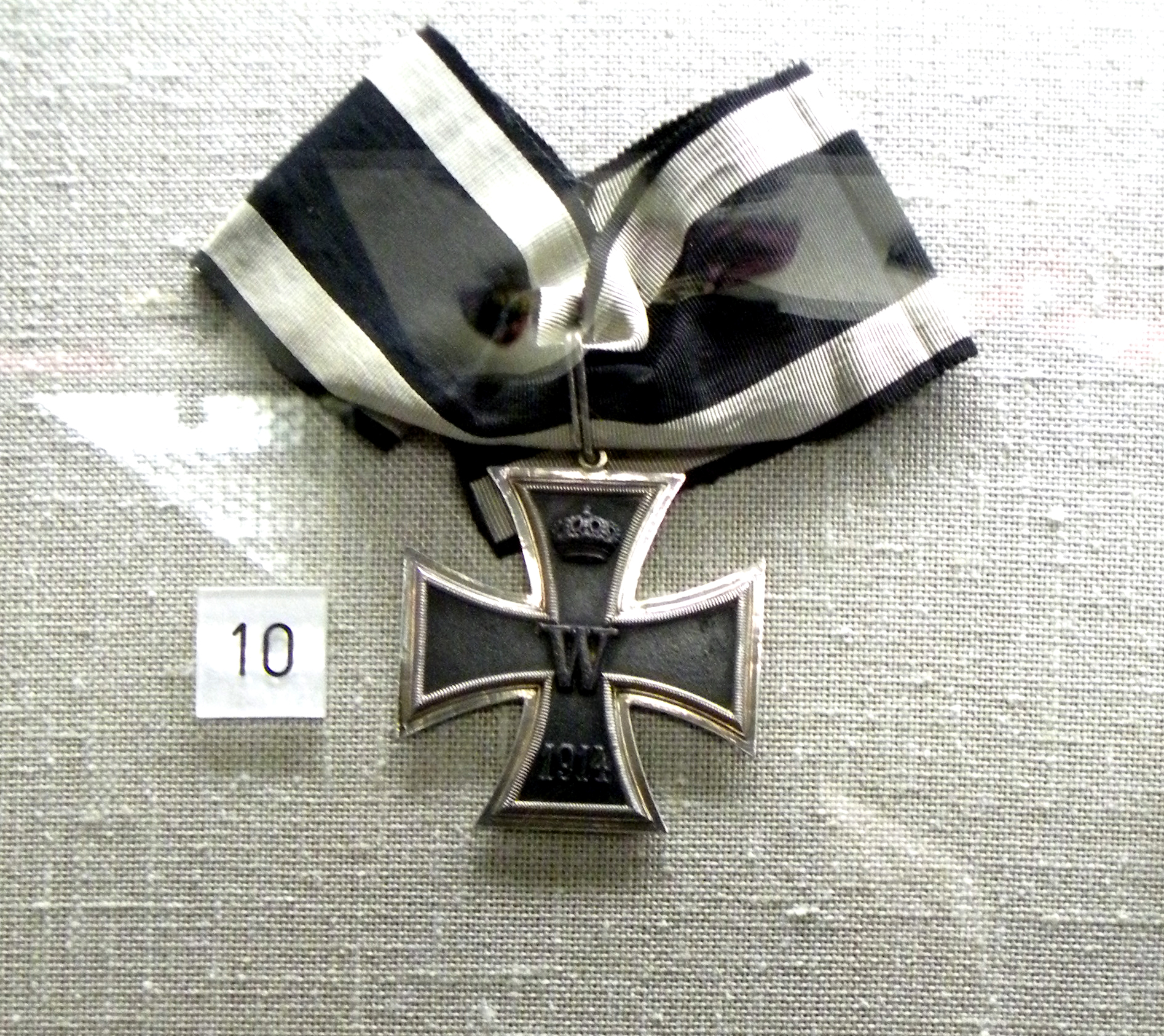 Большой Железный Крест 1914 года.Экспонат Баварского военного музея. Ингольштадт.